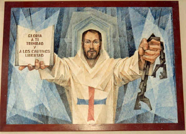 San Juan de Mata, fundador de los hermanos de la Orden de la Santísima Trinidad